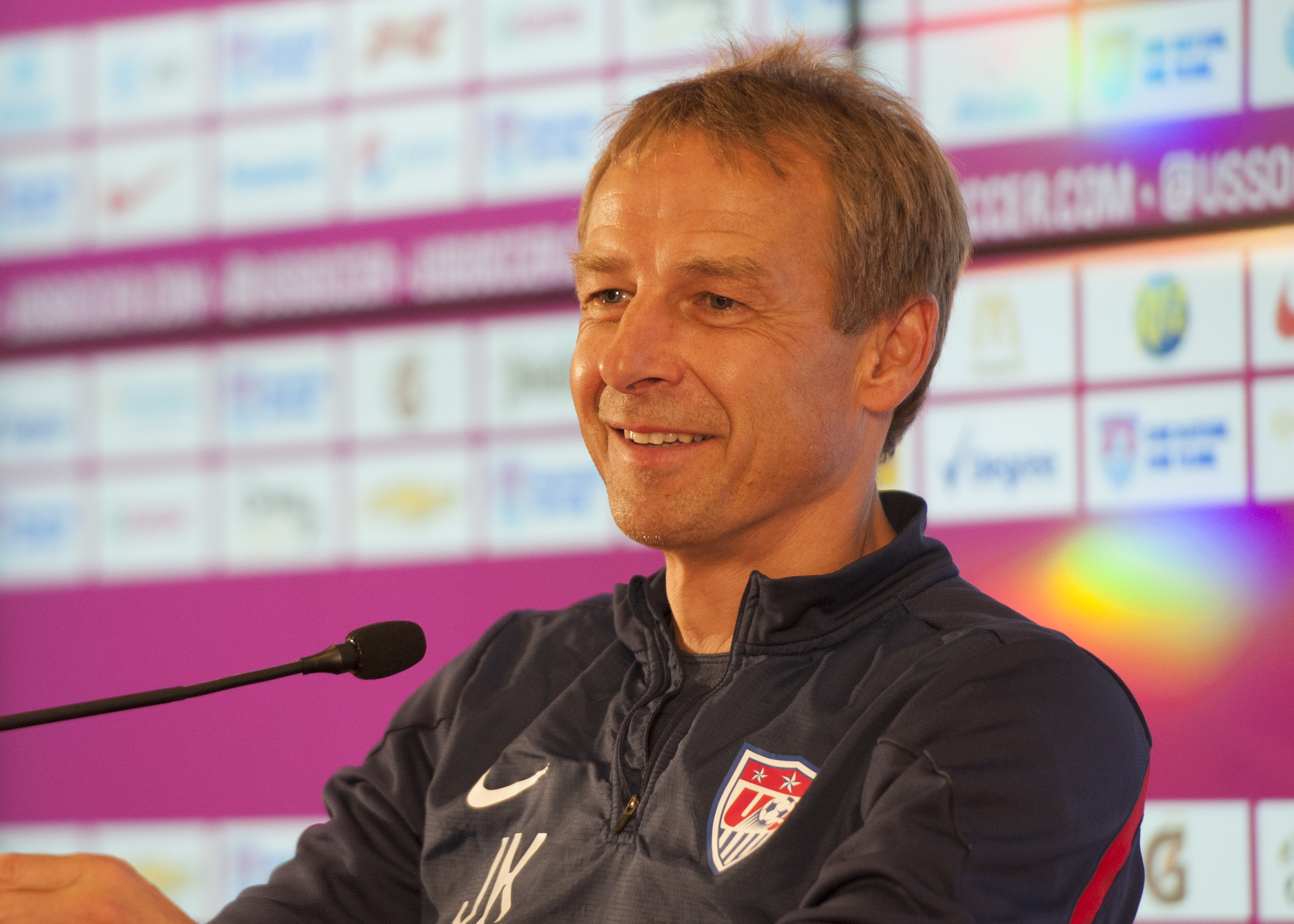 © Carl Fonticella 2014